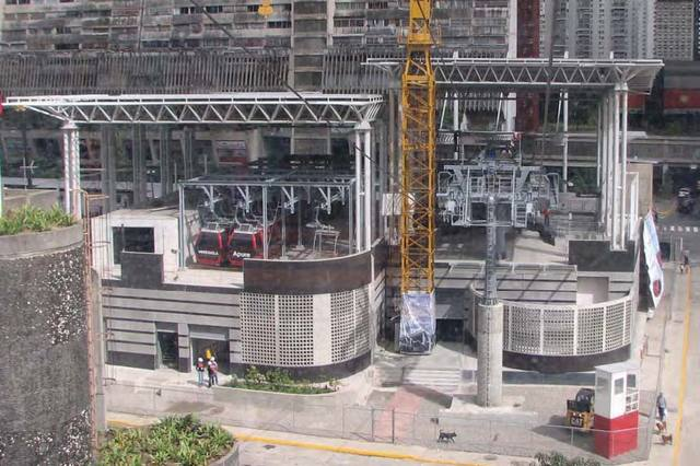 Metrocable de Caracas estacion parque central 2009